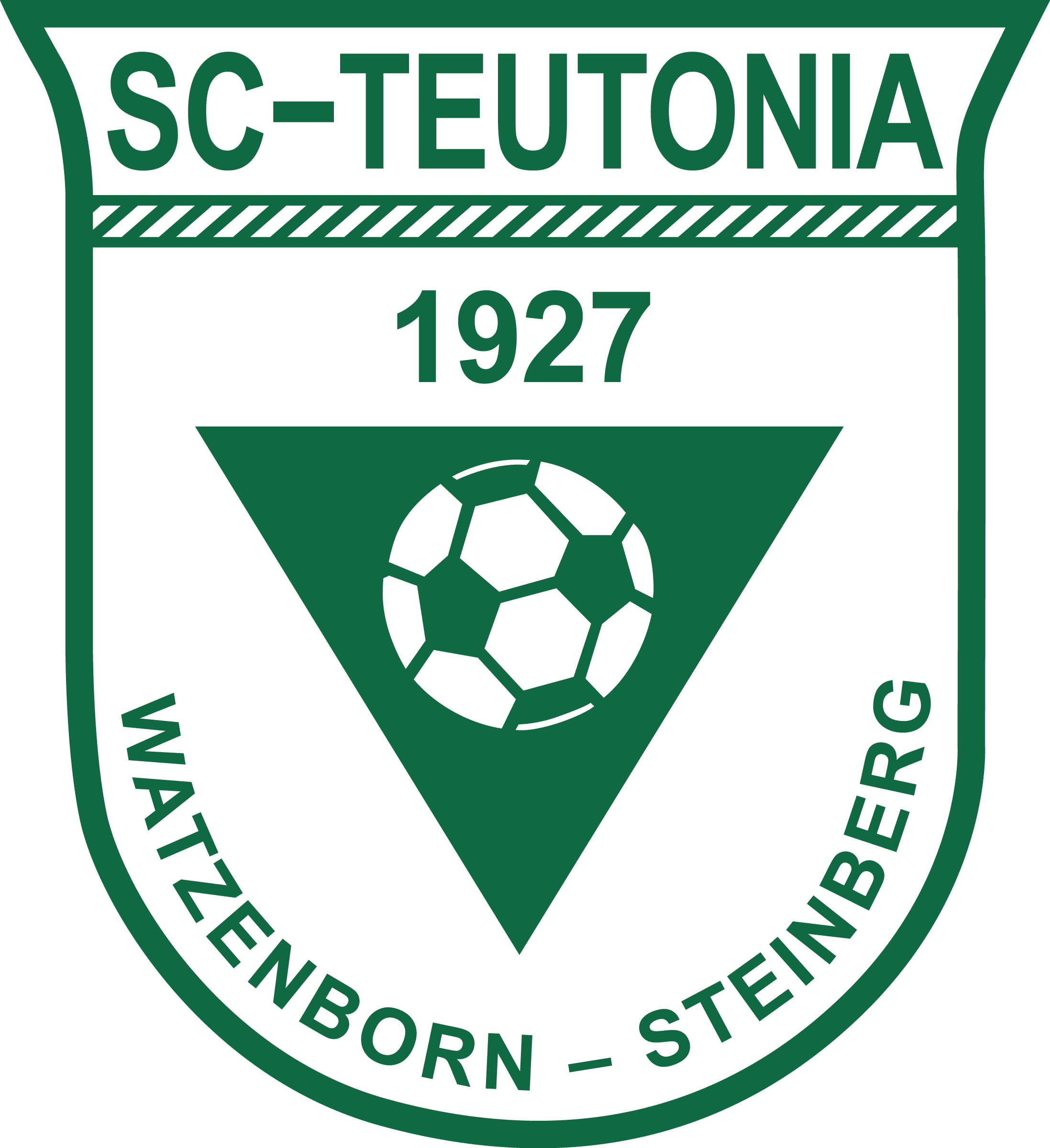 Wappen von SC Teutonia Watzenborn-Steinberg